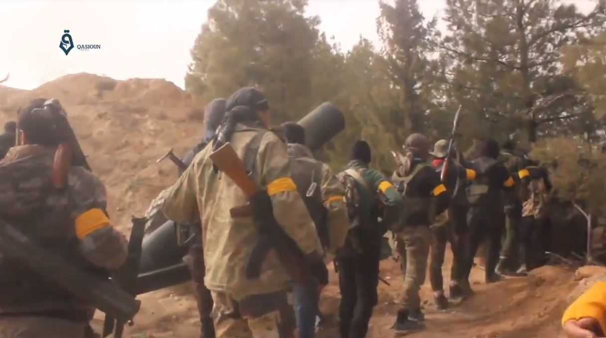 Rebelles de l'Armée syrienne libre lors de l'offensive d'Afrine contre les Kurdes des YPG, 25 janvier 2018.